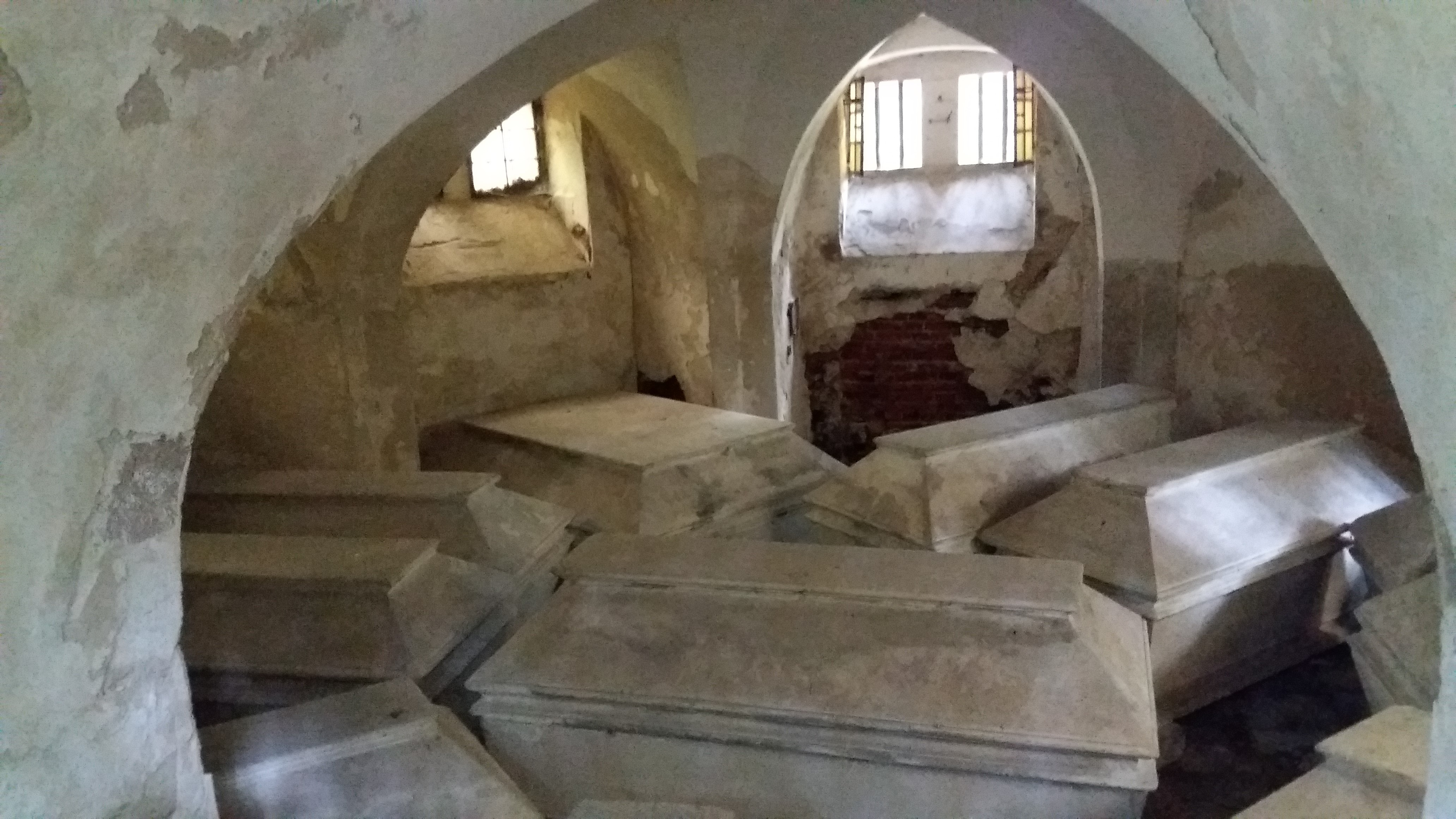 Sarkophag Hans David Ludwig Graf Yorck von Wartenburgs in der Gruft des Gräflich Yorck von Wartenburgschen Mausoleums im Schlosspark von Klein Oels